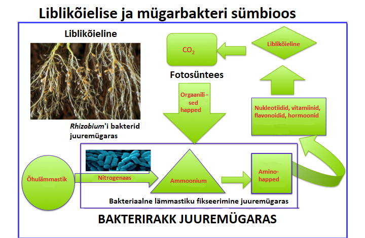 'Eesti: Lämmastik on taimes kõige sagedamini limiteeriv toitaine. Et panna limitatsioonile vastu, kasutavad liblikõielised oma juuremügarates lämmastikku fikseerivaid baktereid (perekonnast Rhizobium). Bakterid fikseerivad õhulämmastikku ja modifitseerivad seda ammooniumiks. Seejärel assimileeritakse ammoonium nukleotiidide, aminohapete, vitamiinide ja flavonoidide koosseisu. Need ained on taimekasvuks hädavajalikud. Taime juurerakud muundavad suhkruid orgaanilisteks hapeteks, millega varustatakse mügarbaktereid – moodustuvad sümbiootilised suhted Rhizobiumi ja liblikõieliste vahel.